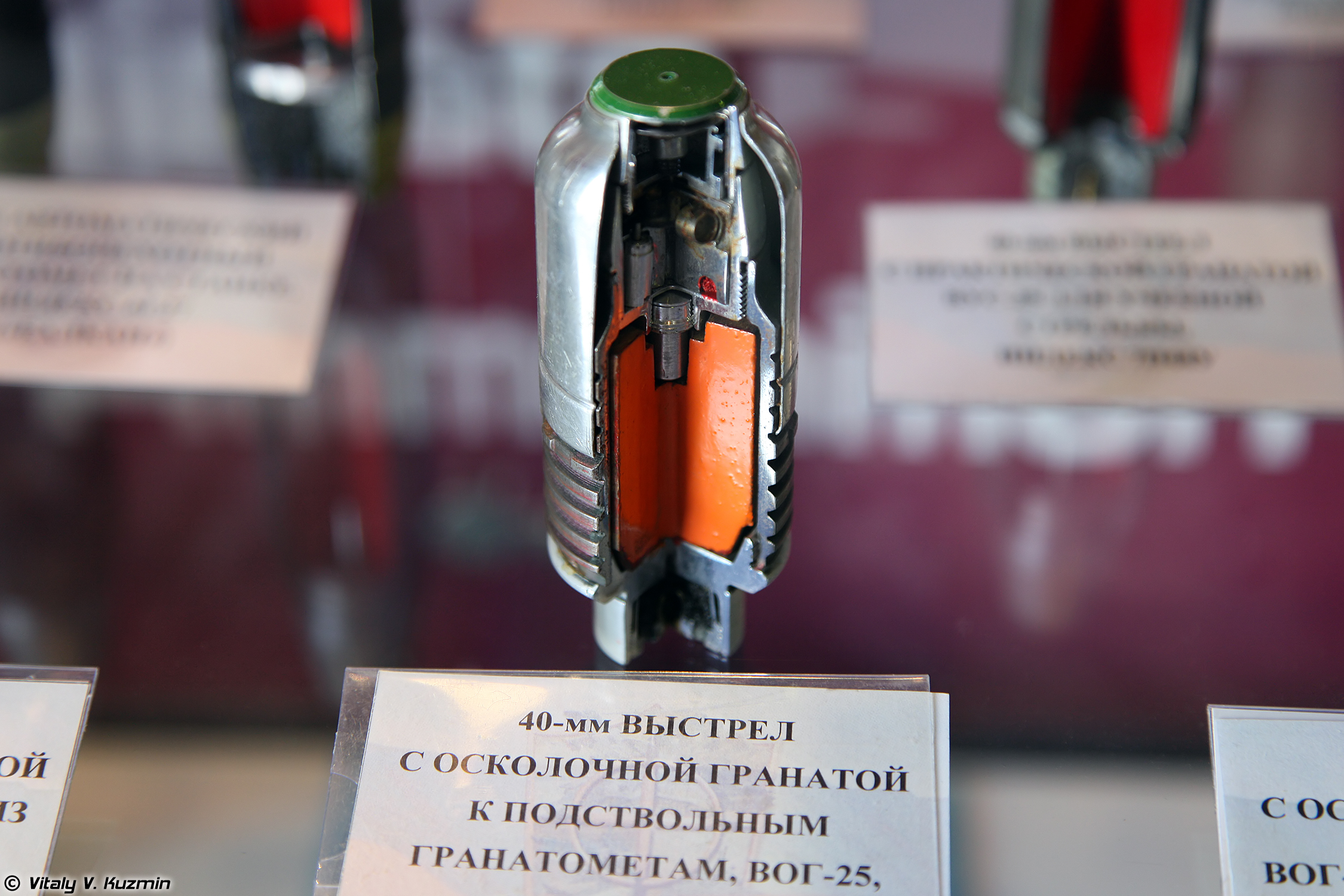 40-мм выстрел ВОГ-25 7П17 (40mm VOG-25 7P17 round)